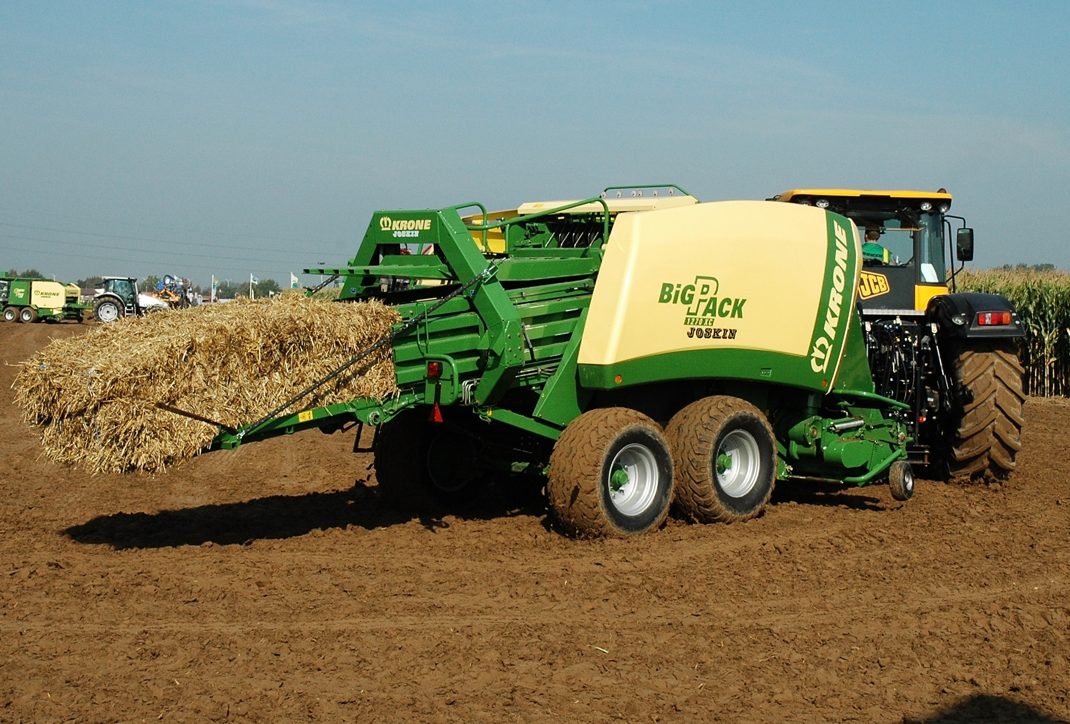 JCB Fastrac 8250 und Krone-Großpackenpresse BiGPack 1270 XC mit X-Cut-Schneidwerk auf den Werktuigendagen 2007 (abgebildet ist ein Exemplar des belgischen Krone-Importeurs Joskin)